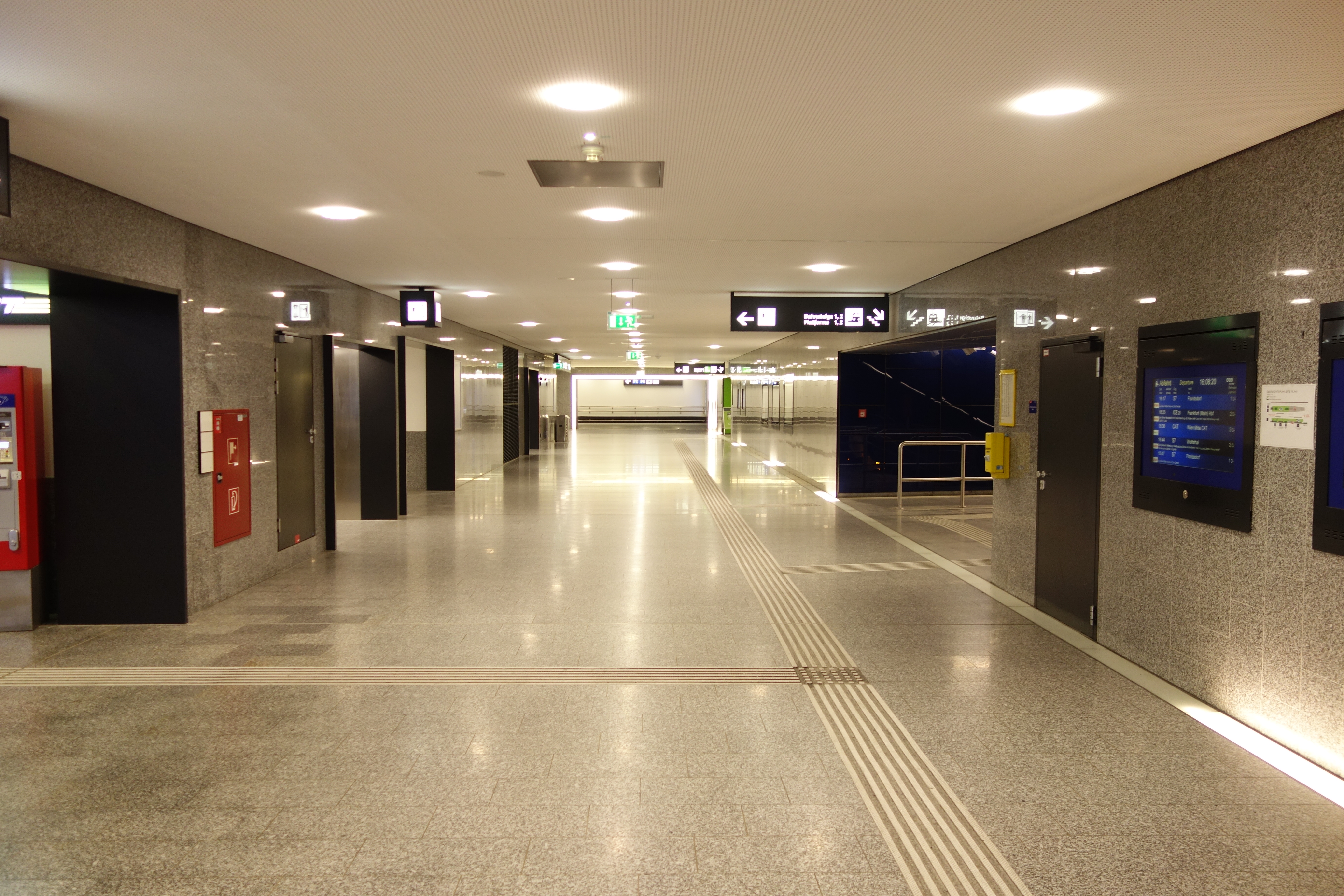 Der Zugang Mitte zum Bahnhof Flughafen Wien im Jänner 2015. Hier besteht zusätzlich auch die Möglichkeit an die Oberfläche und über eine Verteilerpassage (hinten, in der Bildmitte nach links abzweigend) zu Parkhaus 4, Parkplatz C und dem Office Park zu gelangen.